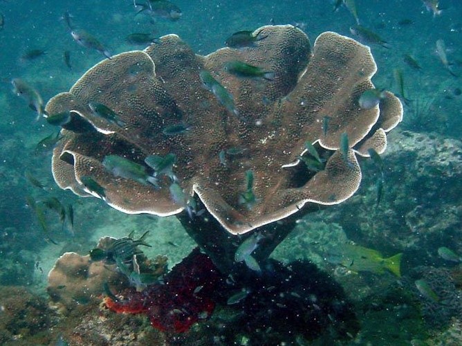 Turbinaria reniformis en Koh Phangan, Tailandia